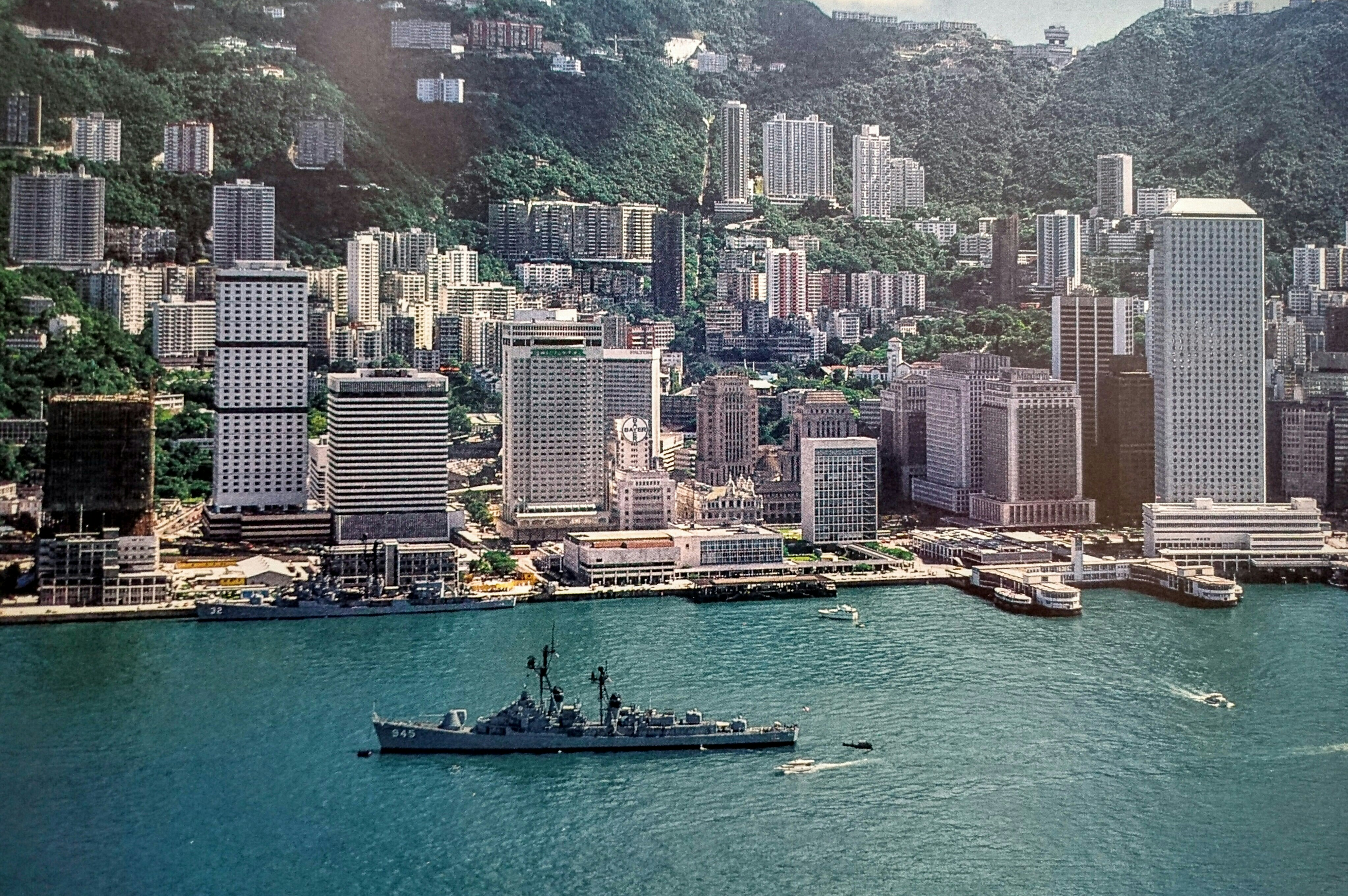 Central, Hong Kong